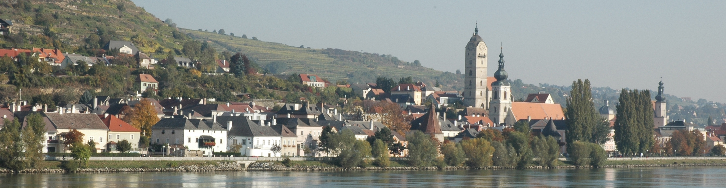 Panoramaansicht von Stein an der Donau (Stadt Krems an der Donau), Austria, Niederösterreich